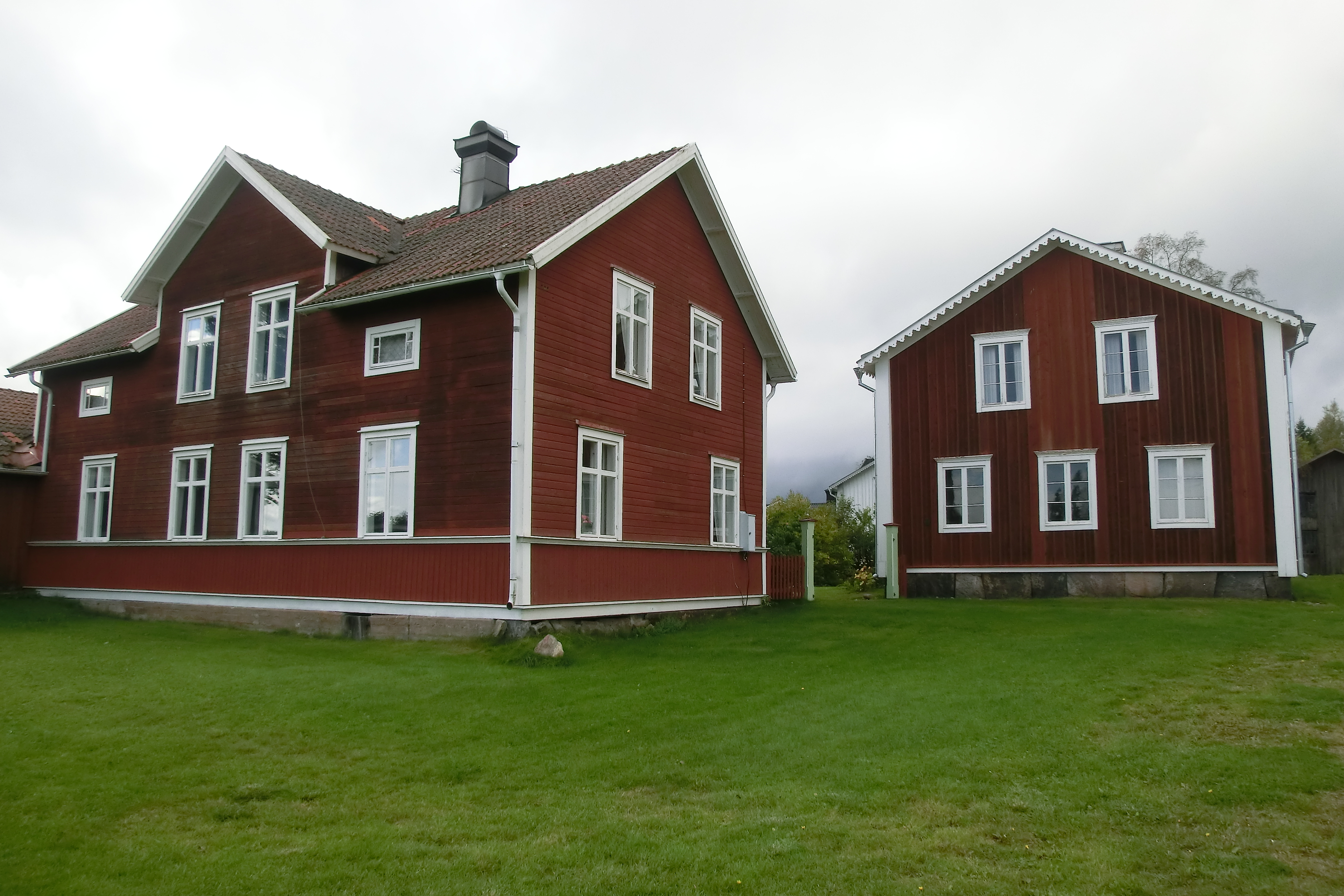 Svensgård i Å, Jättensta